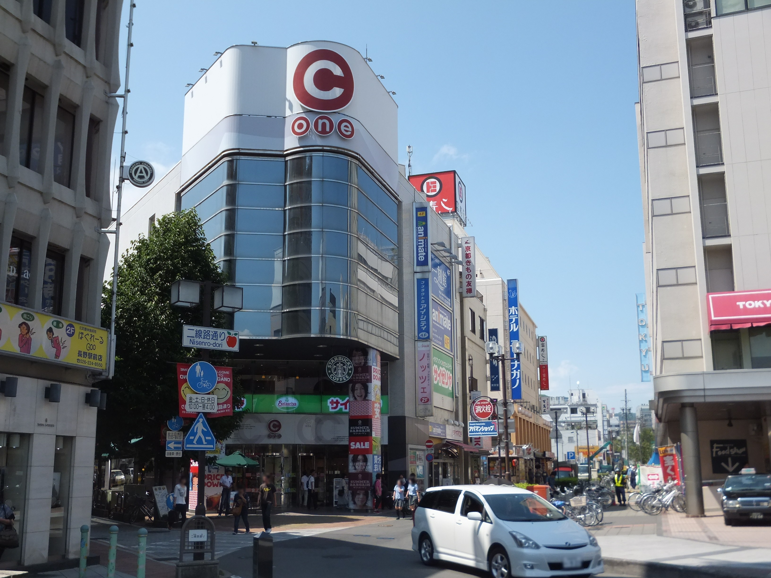 二線路通り入り口とC-oneビル